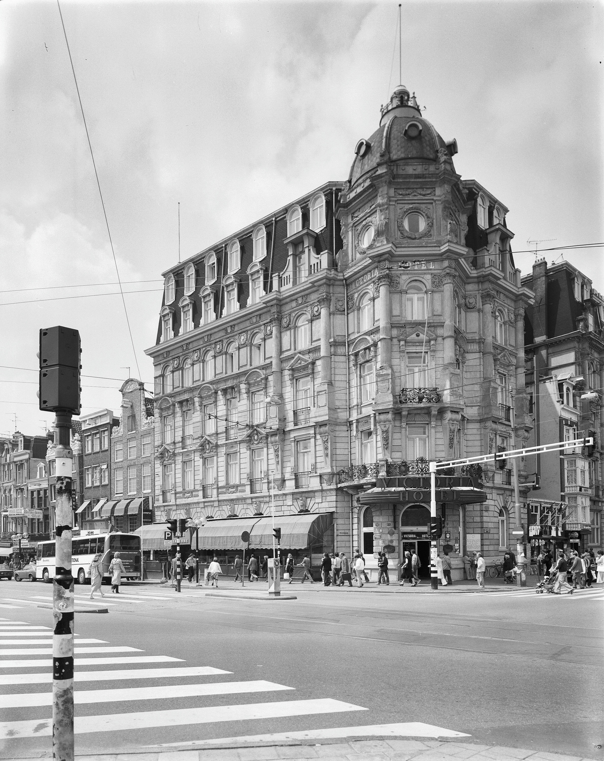 overzicht